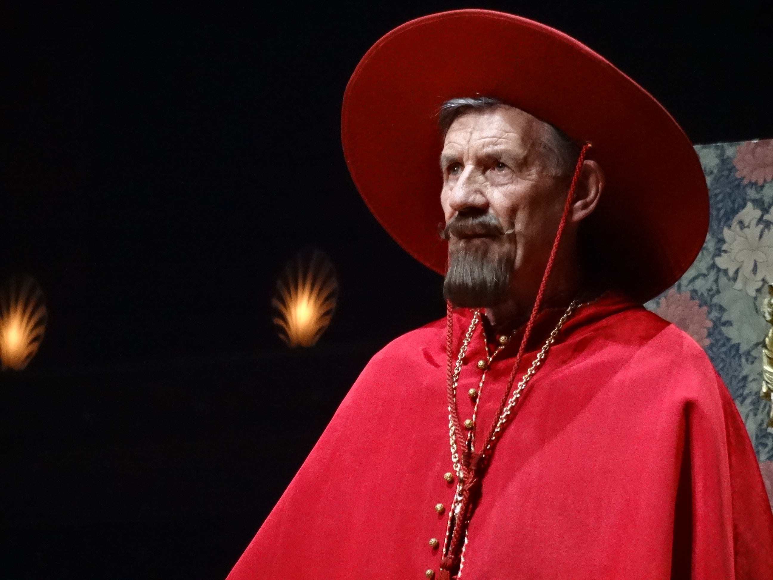 Photo 02-07-14 12 47 33